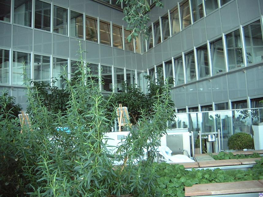 Commerzbank Tower Innenhof im 20.OG (Frankfurt)